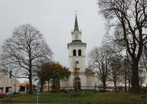 Vimmerby kyrka, BeBR 21400000442789